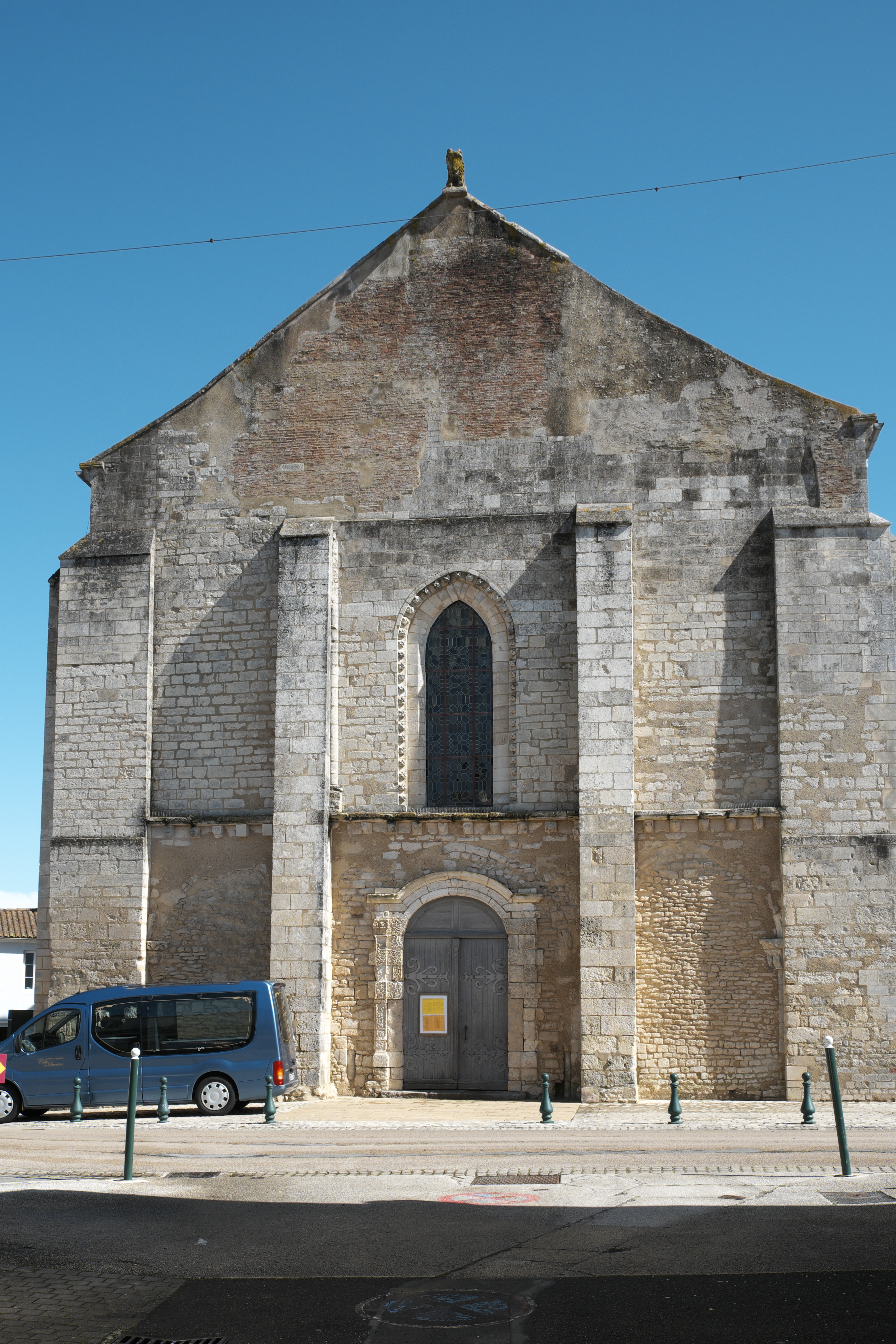 Katholische Kirche Notre-Dame-des-Anges in Angles im Département Vendée (Pays de la Loire/Frankreich)